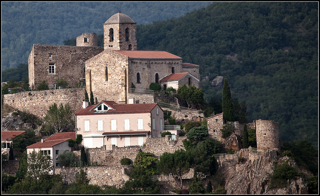 Chapelle du village de Ste-Yvoine. Puy de dôme